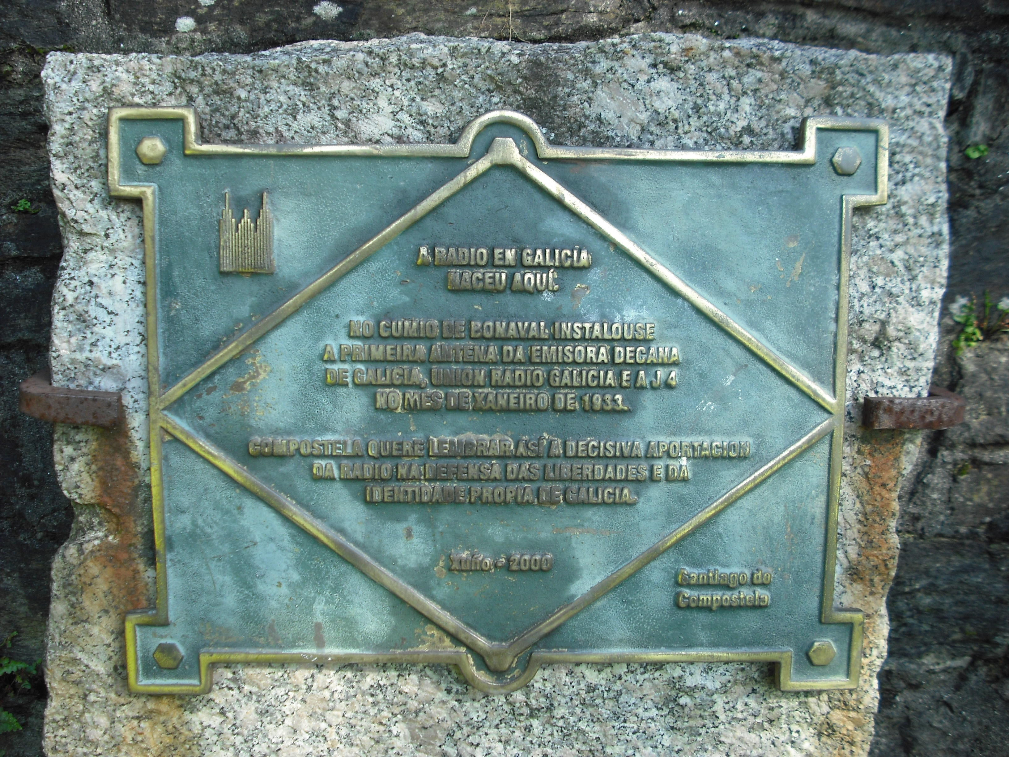 Placa recordatoria de la primera antena de radio de Galicia, situada en el Parque de Bonaval de Santiago de Compostela